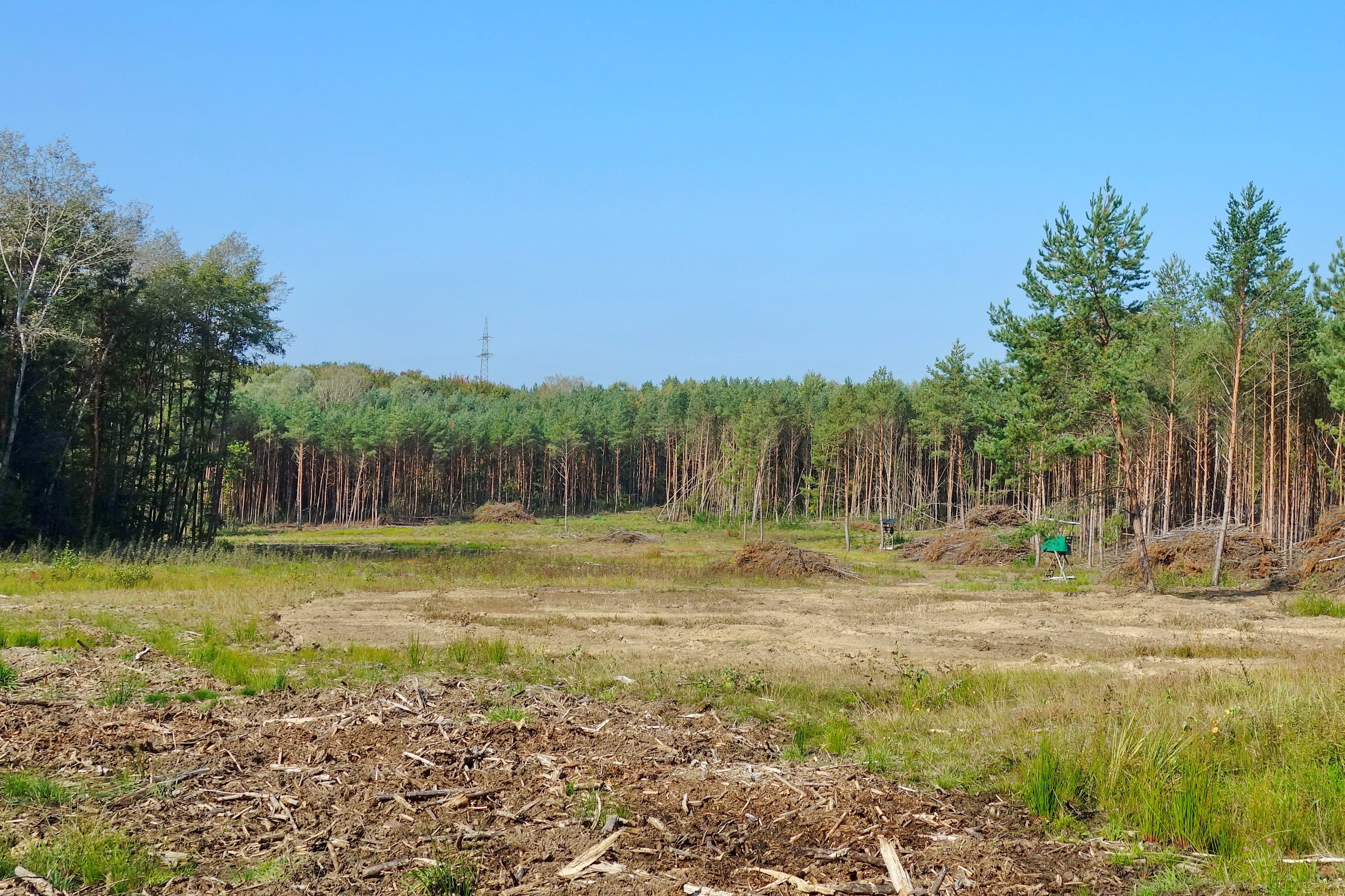 Das Naturschutzgebiet Willersinn'sche Grube bei Dietzenbach (NSG-Kennung 1438013) liegt im hessischen Landkreis Offenbach.